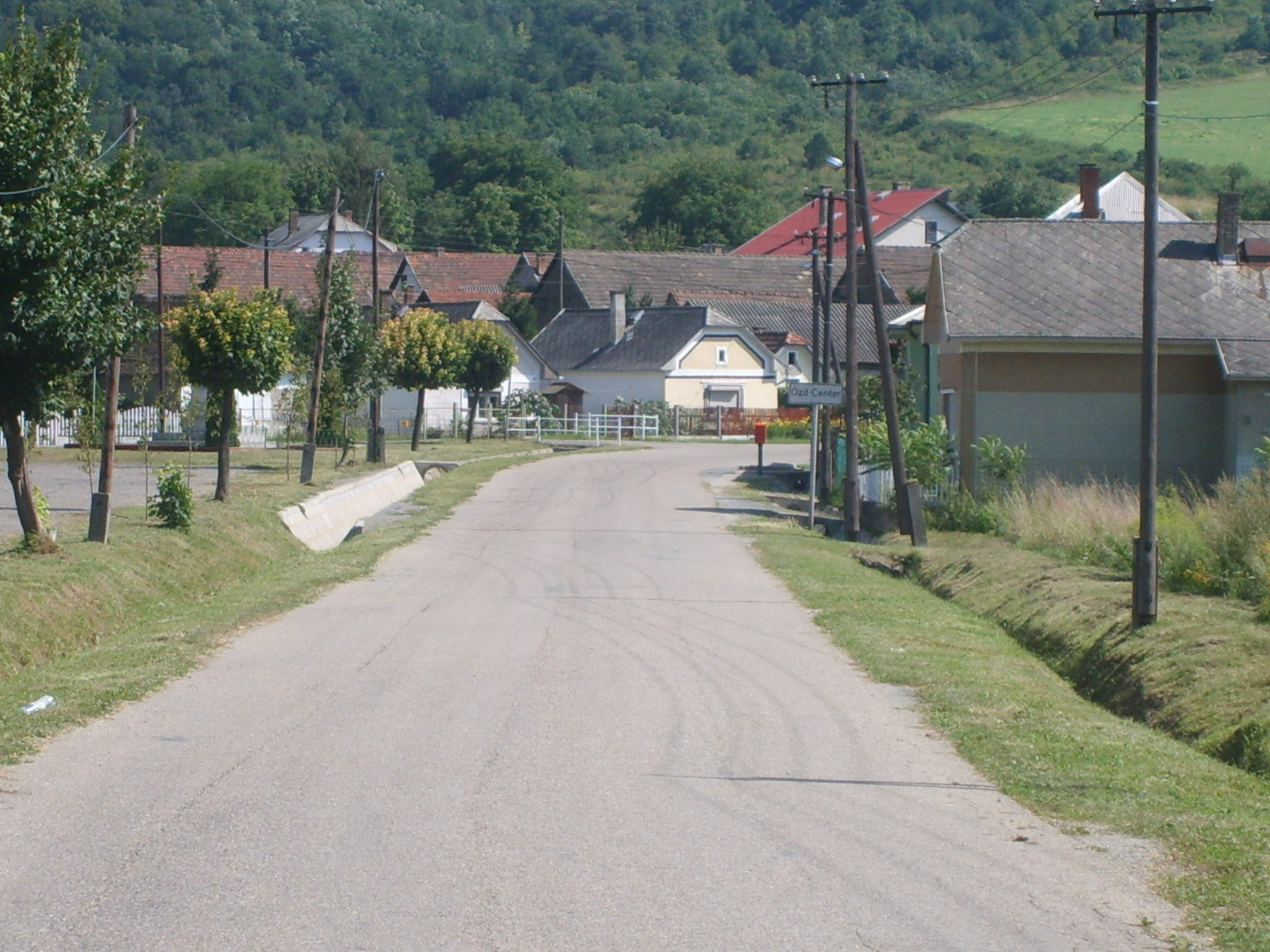 Ózd városrésze-Center